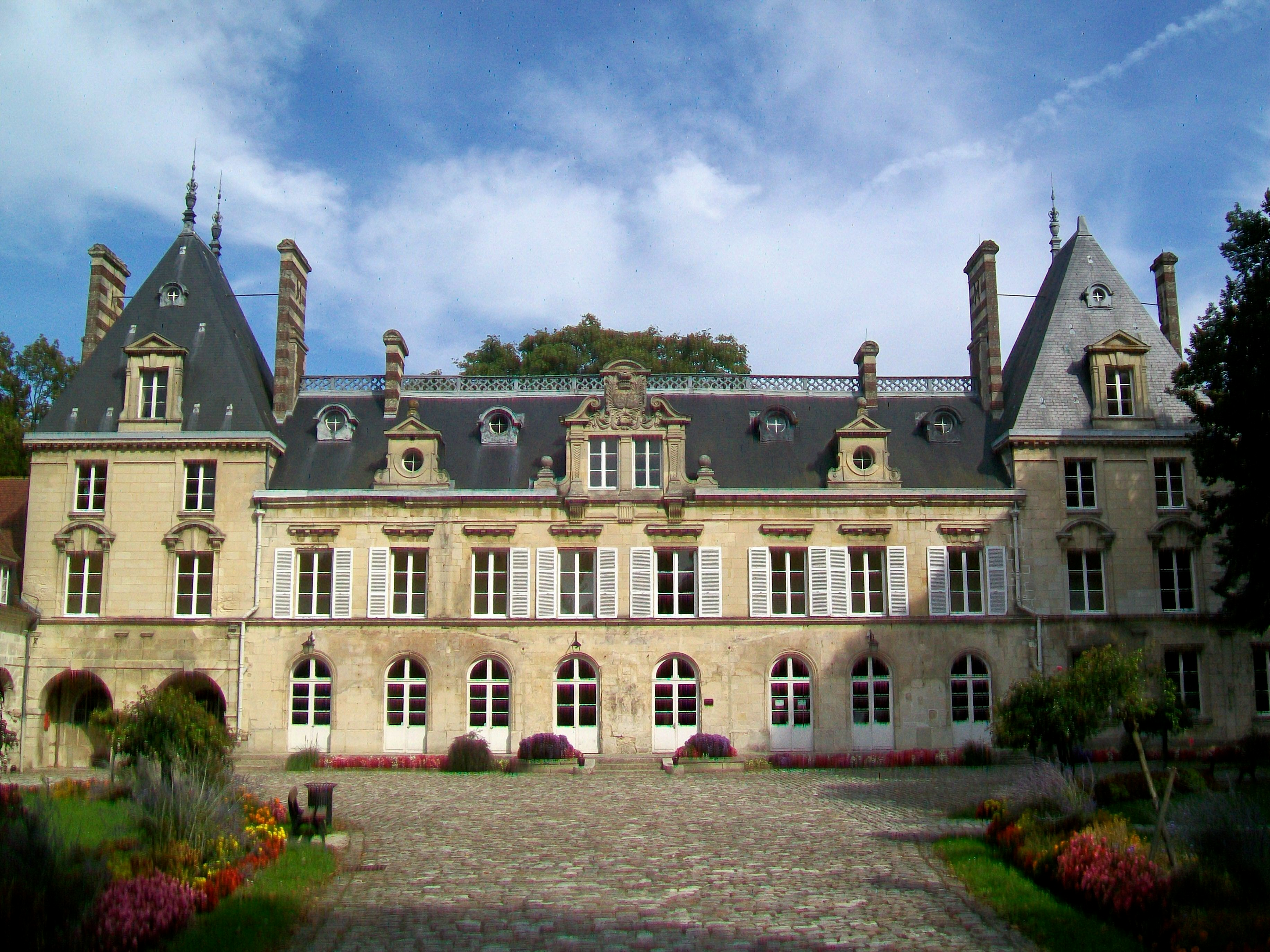 Le château d'Aramont du XVIIe siècle, propriété de la commune ; façade occidentale.